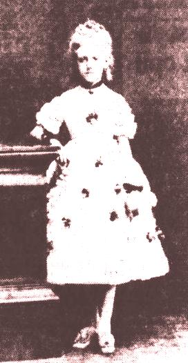 Elisabeth Couperus-Baud